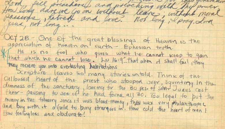 Jim Elliot híres újságja